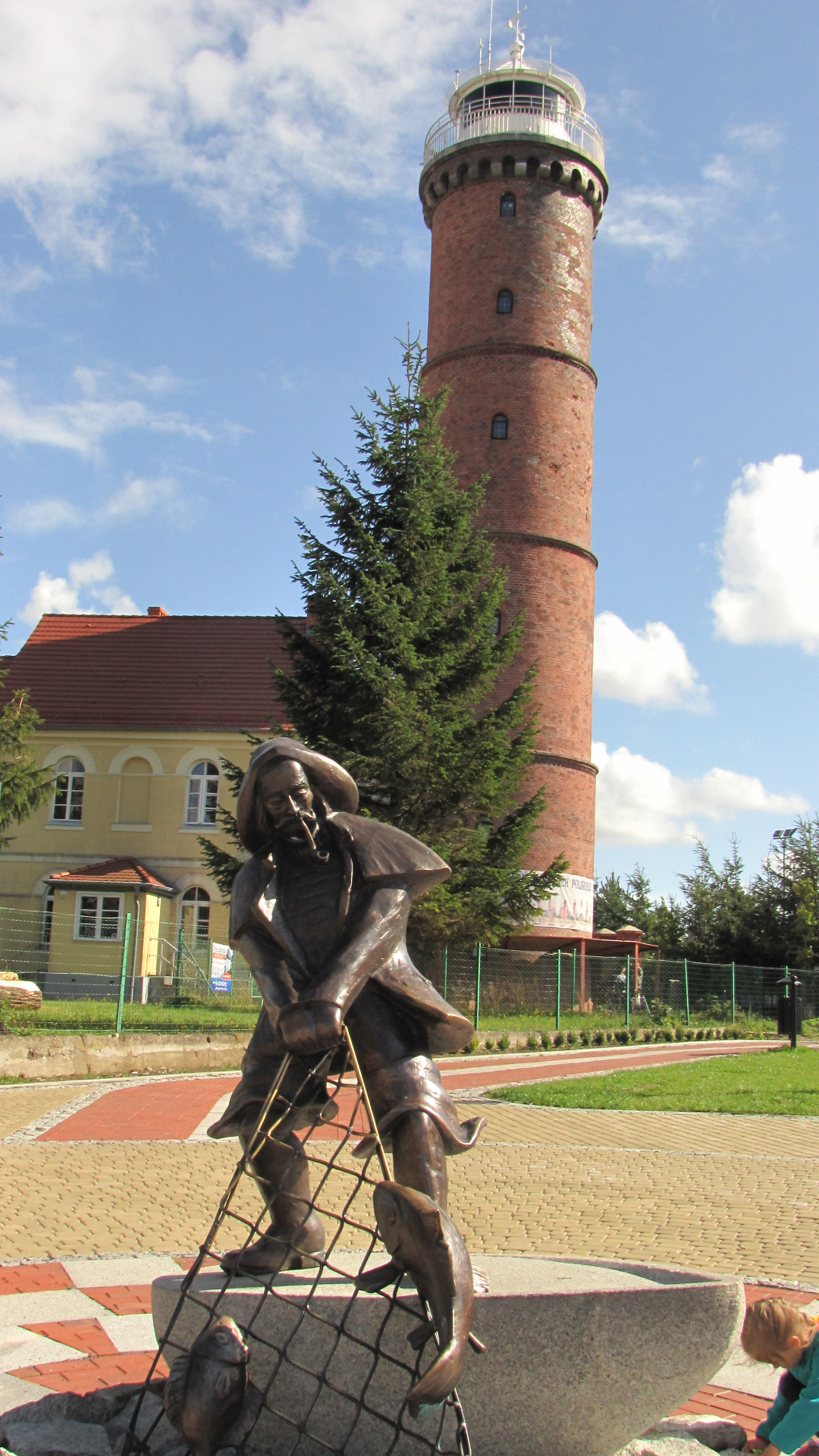 Jarosławiec, zespół latarni morskiej